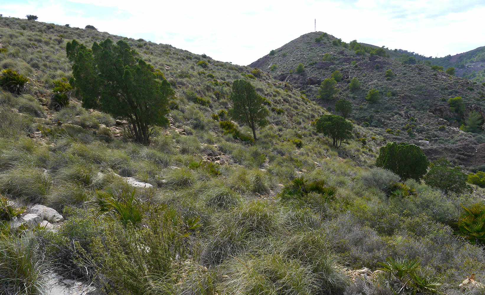 Tetraclinis articulata en el Cabezo del Sabinar, en Cartagena, España.